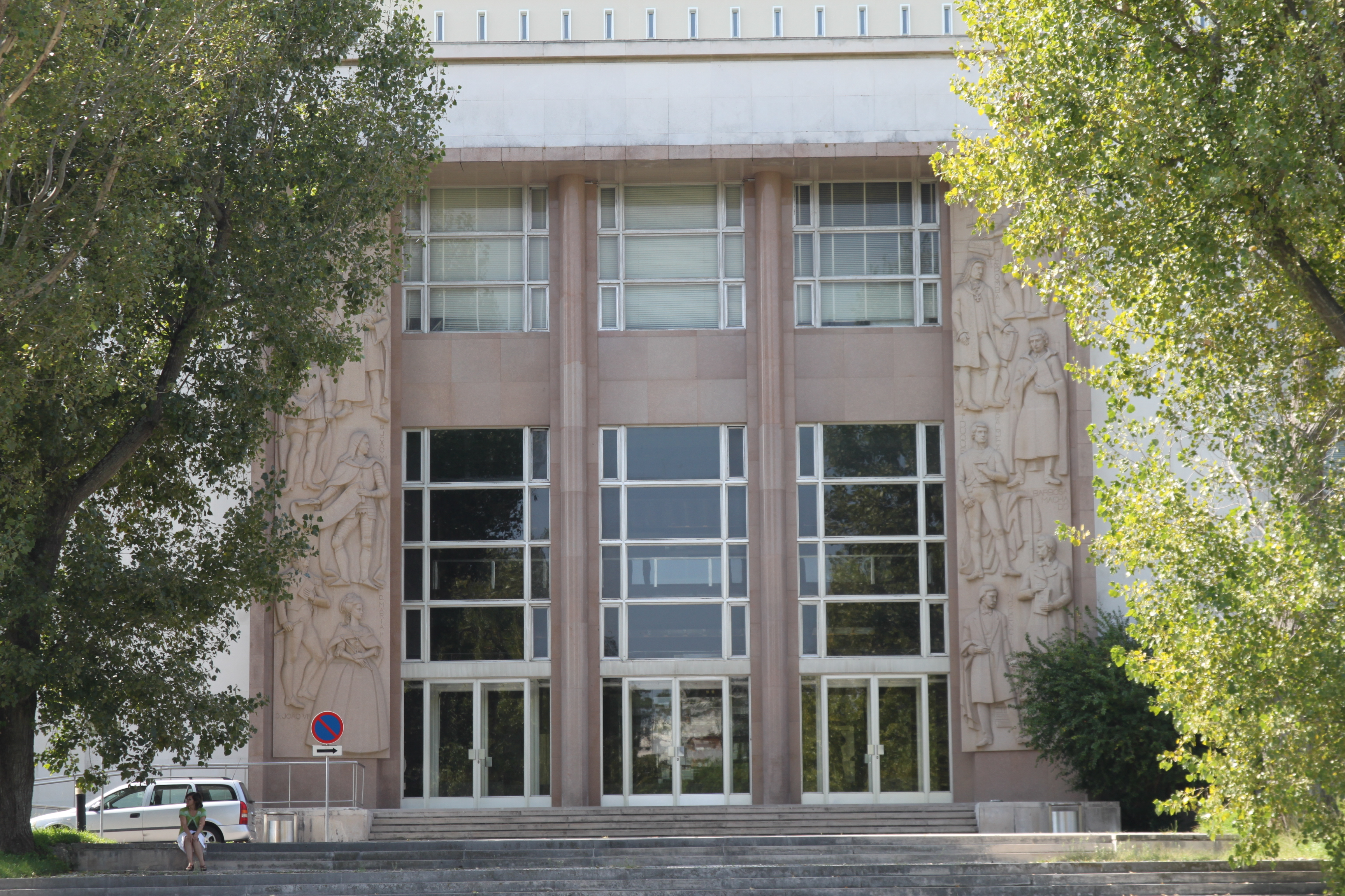 Biblioteca Nacional de Portugal e jardins envolventes, incluindo o património integrado This file was uploaded for Wiki Loves Monuments in Portugal with the unique identifier 7389721.